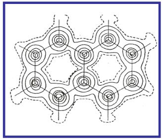 Dentsitate elektronikoa